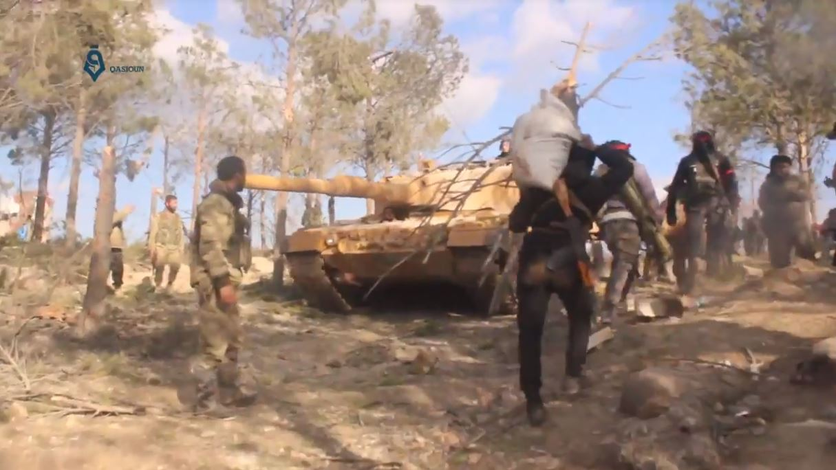 Rebelles syriens et soldats turcs après la capture de la colline de Bursaya, lors de la bataille d'Afrine, le 29 janvier 2018.